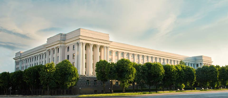 ГУВПО "Белорусско-Российский университет"